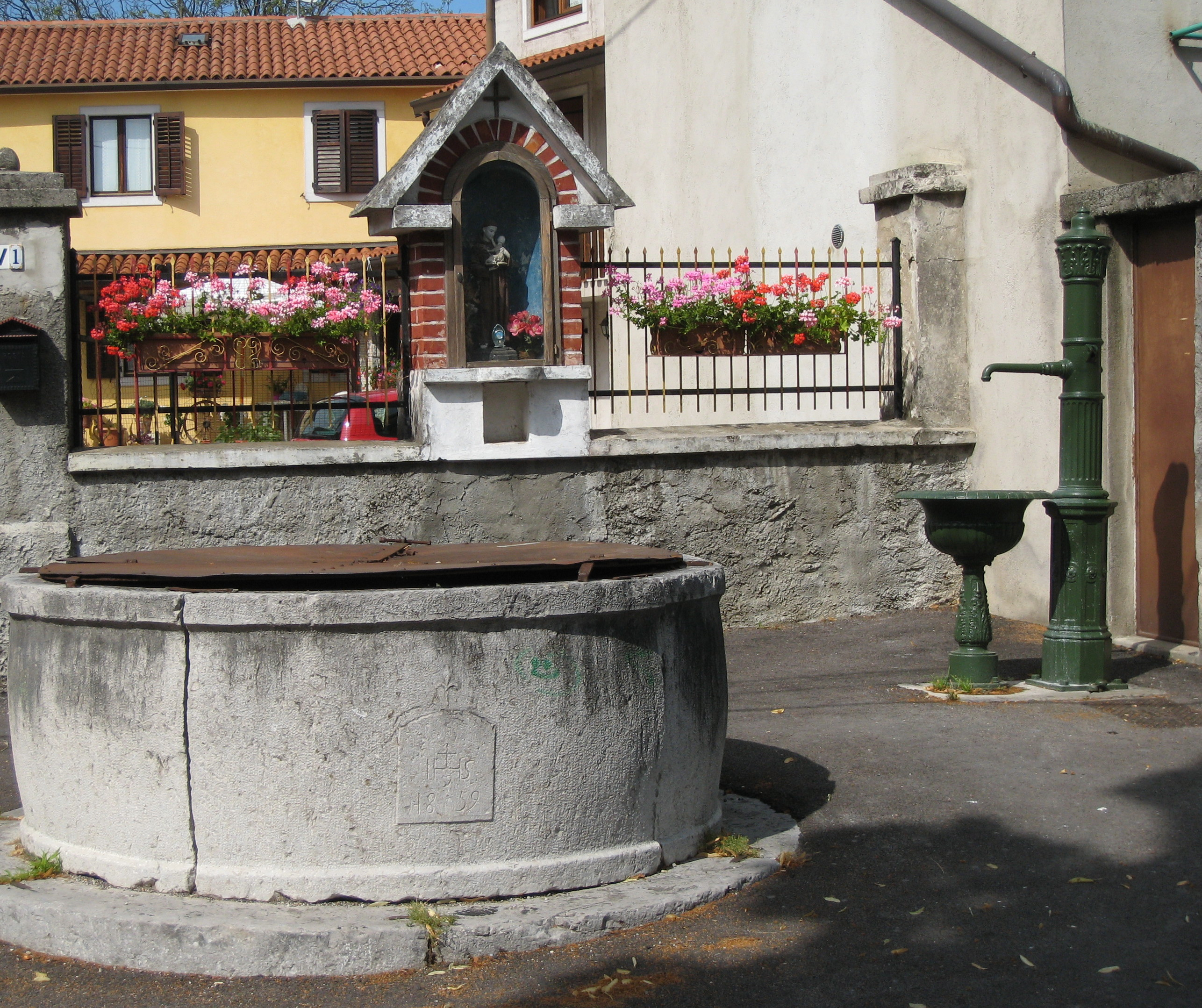 Scorcio di Gropada, frazione di Trieste.